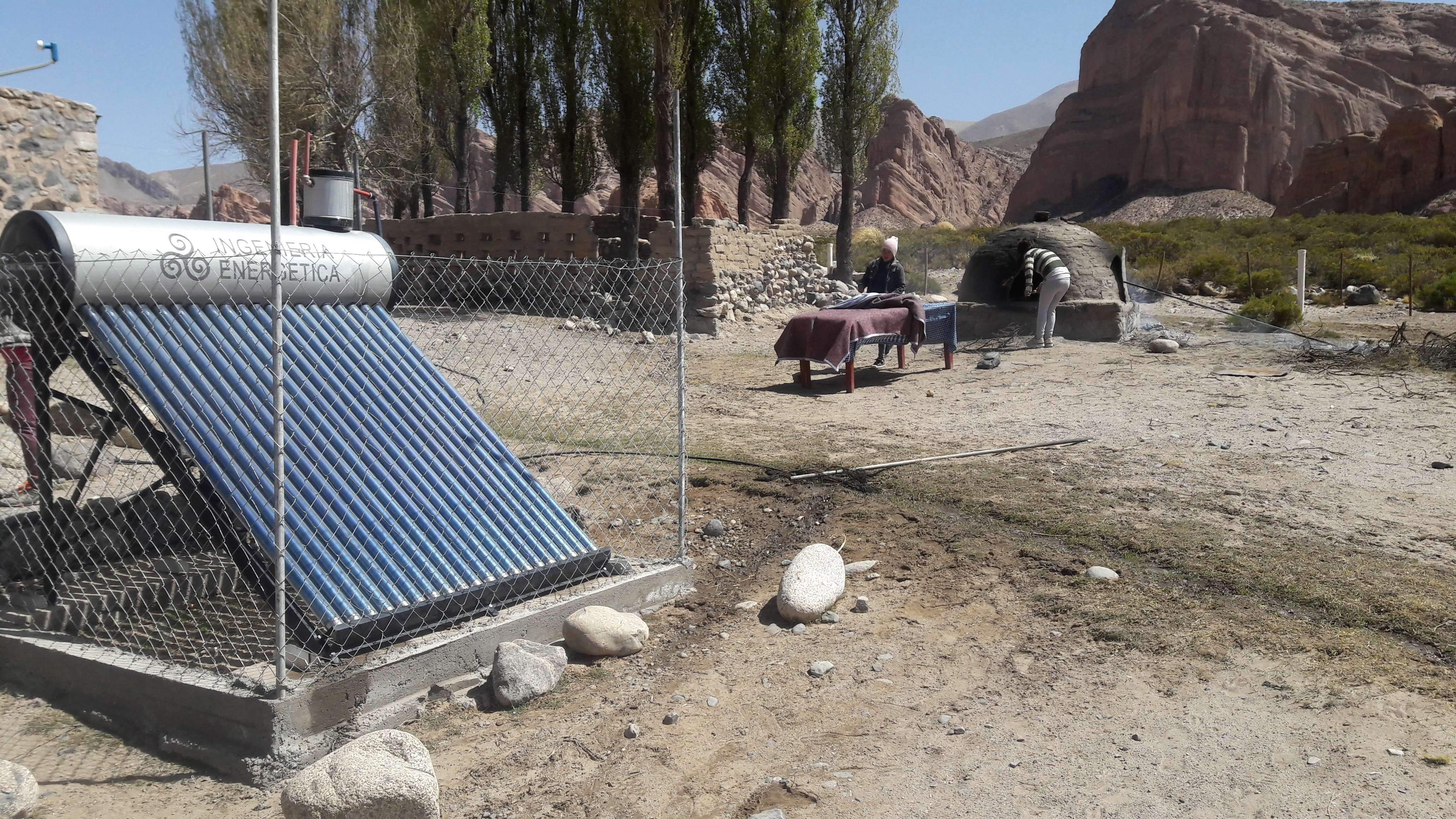 Escuela de "El Tolar", en la puna Catamarqueña, utilizan la energía del sol para calentar agua, ya que no cuentan con energía eléctrica ni gas, para realizar esta acción.